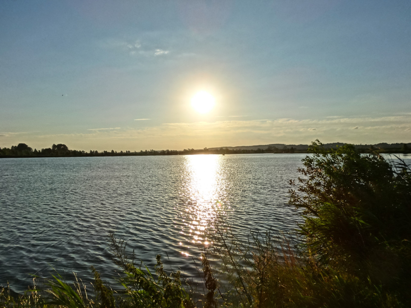 Stawy rybne w miejscowości Lisi ogon, gmina Białe Błota, powiat bydgoski. Stawy położone są w Dolinie Kanału Bydgoskiego